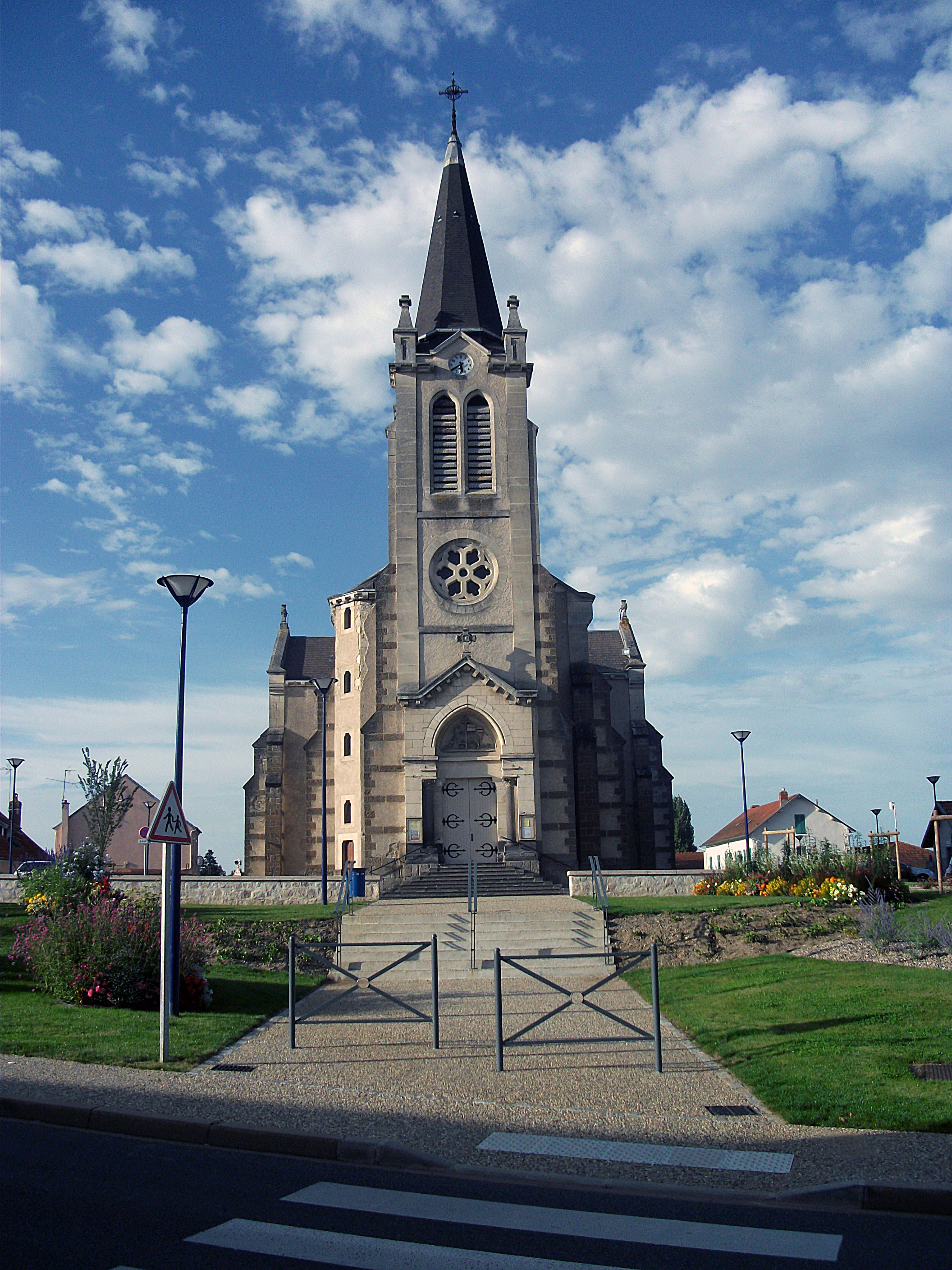 Le parvis de l'église Saint-Laurian de Bellerive-sur-Allier neuf mois après son inauguration fin 2012.